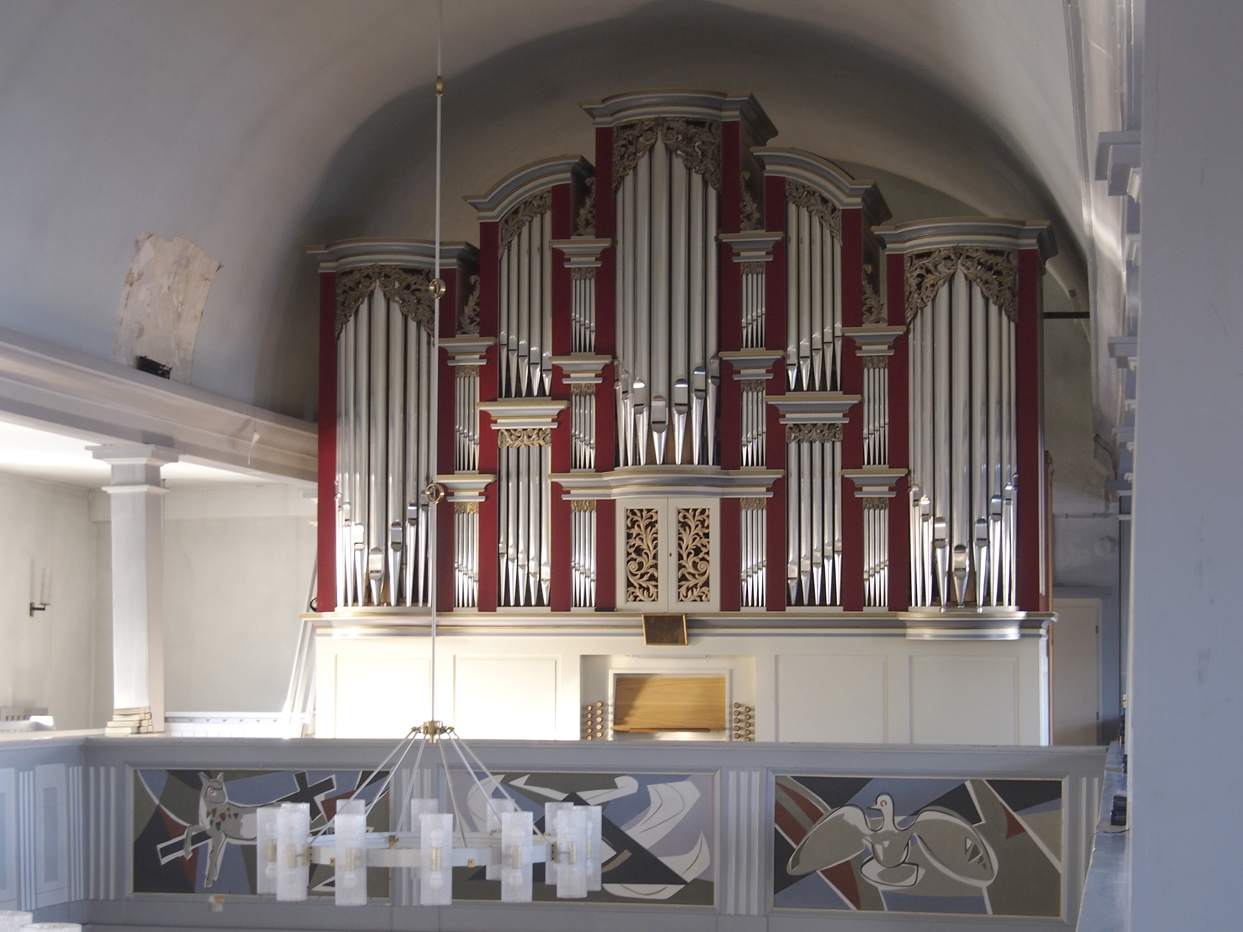 Orgel der St. Lamberti-Kirche in Bergen (Landkreis Celle)